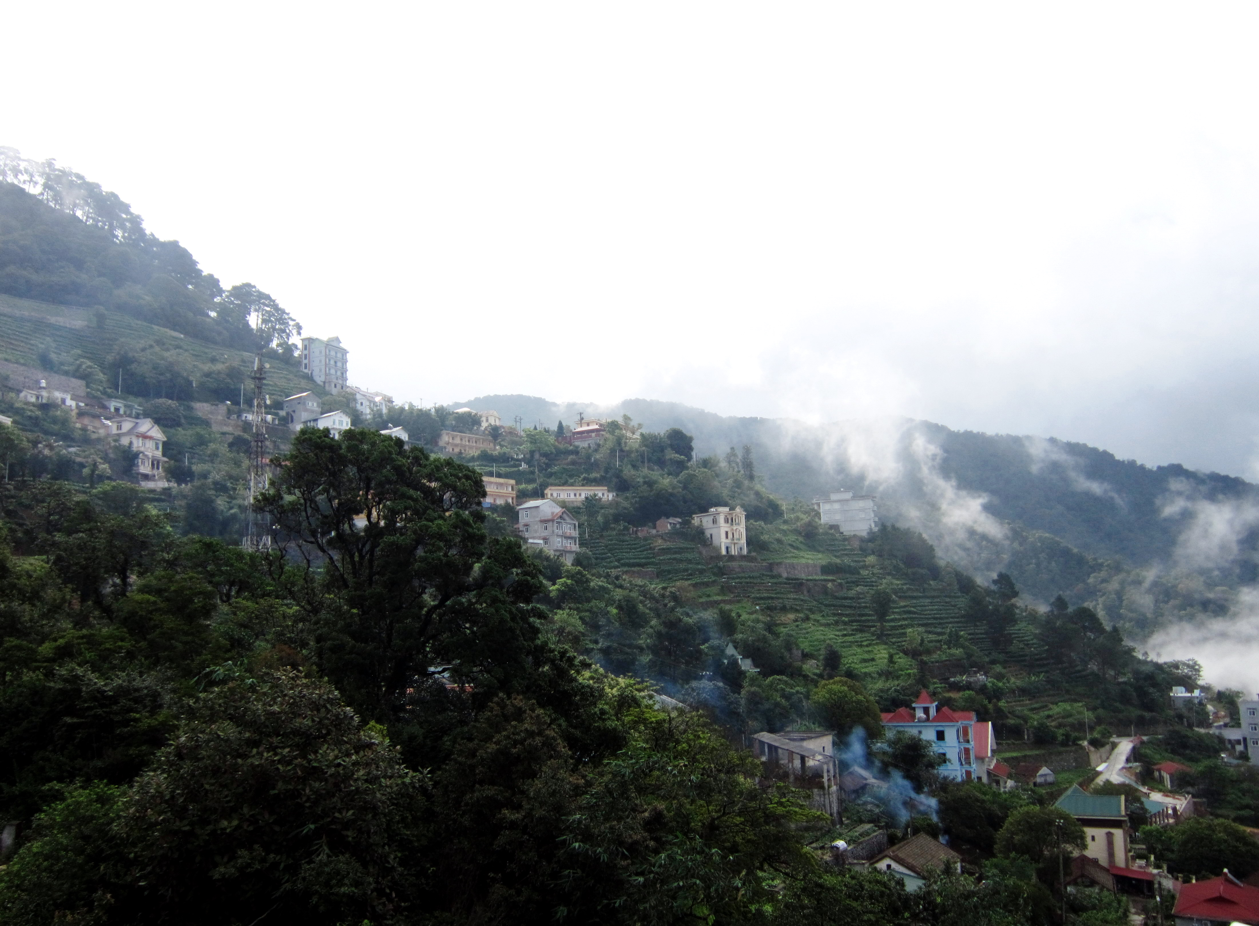 Phong cảnh Tam Đảo ở miền Bắc Việt Nam.